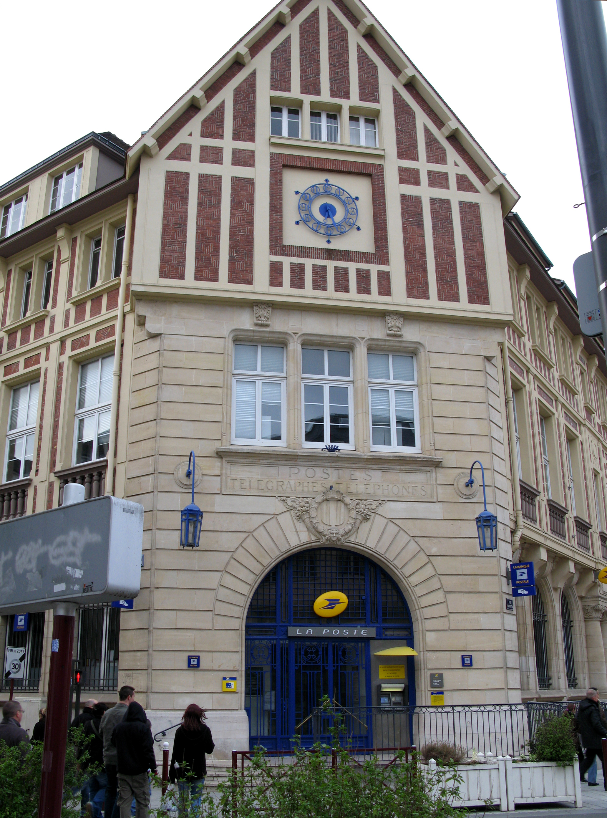 Beauvais (Oise, France) - La Poste, à l'angle de la rue Jean Racine (à gauche) et de la rue Gambetta.